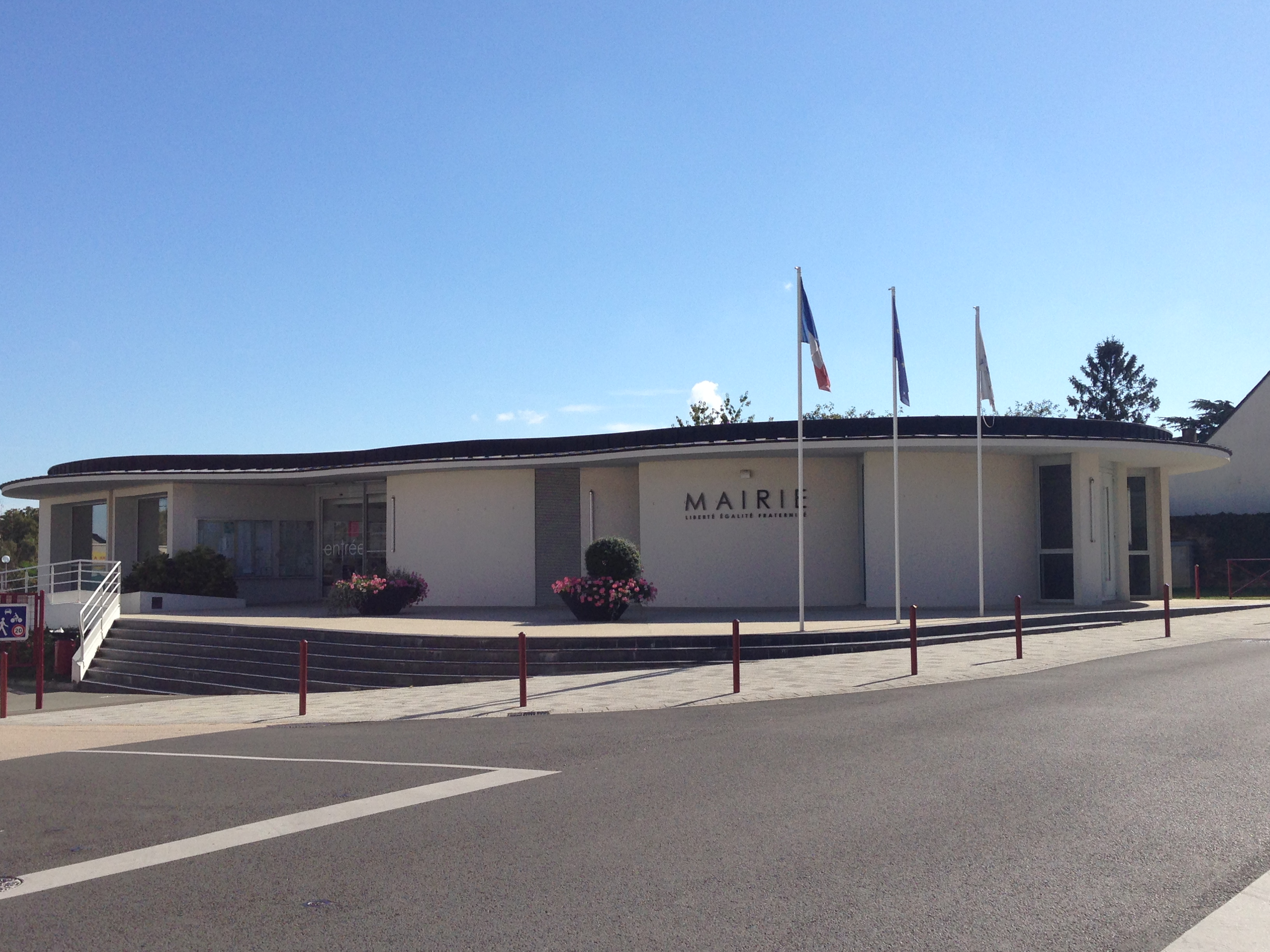 La Mairie et la Place Eric Tabarly - La Membrolle-sur-Longuenée (49)